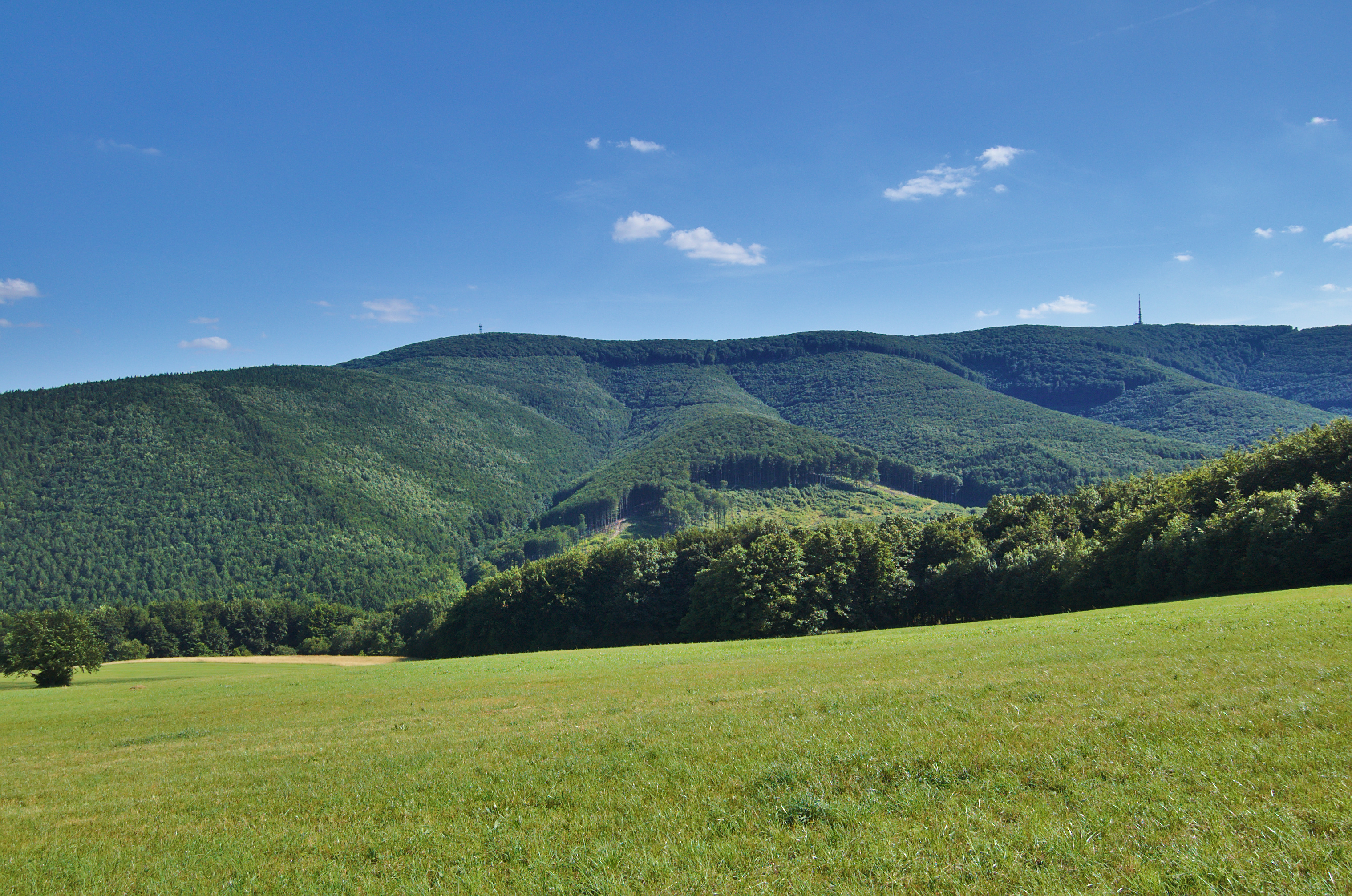 Velká Javořina a Jelenec od Strání, okres Uherské Hradiště